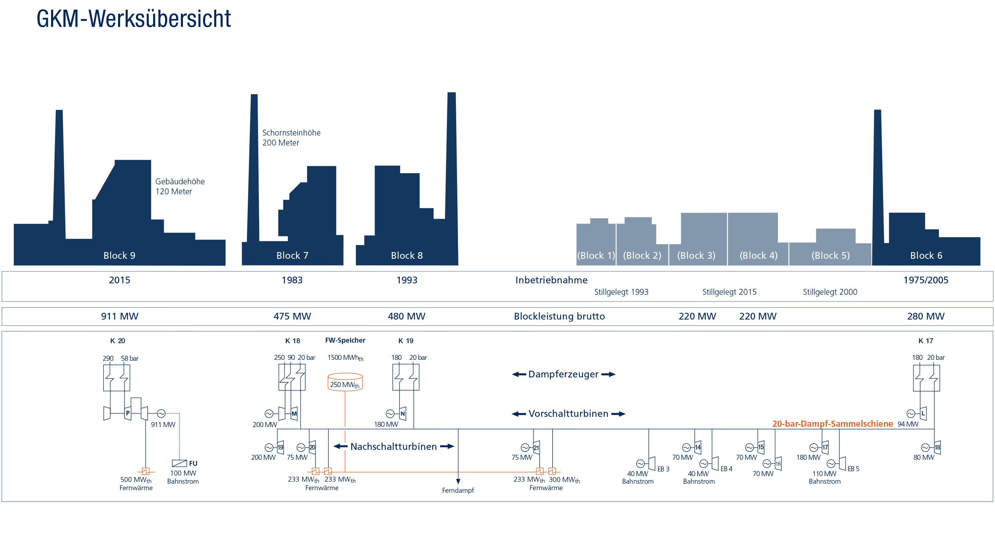 Werkübersicht mit Dampfsammmelschiene